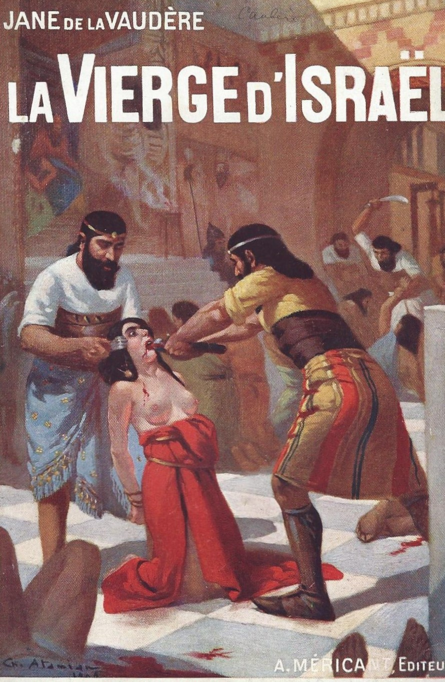 Reproduction de la couverture de la romancière Jane de La Vaudère